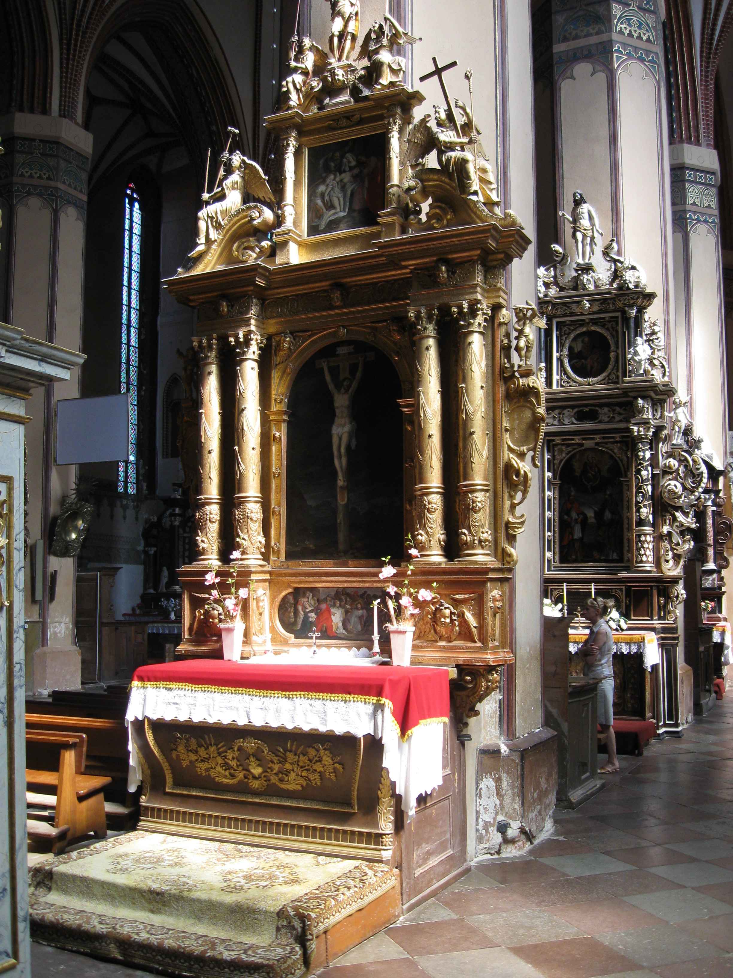 Frombork - Katedra. Ołtarz patronacki Mikołaja Kopernika. (zabytek nr rejestr. A/201)